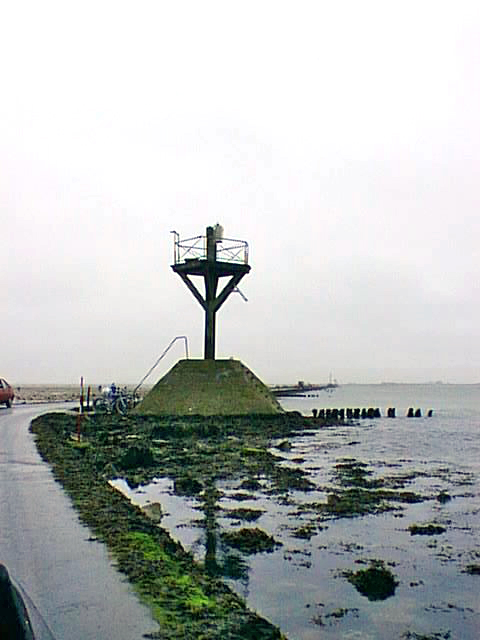 Passage du Gois (Noirmoutier, 1998).